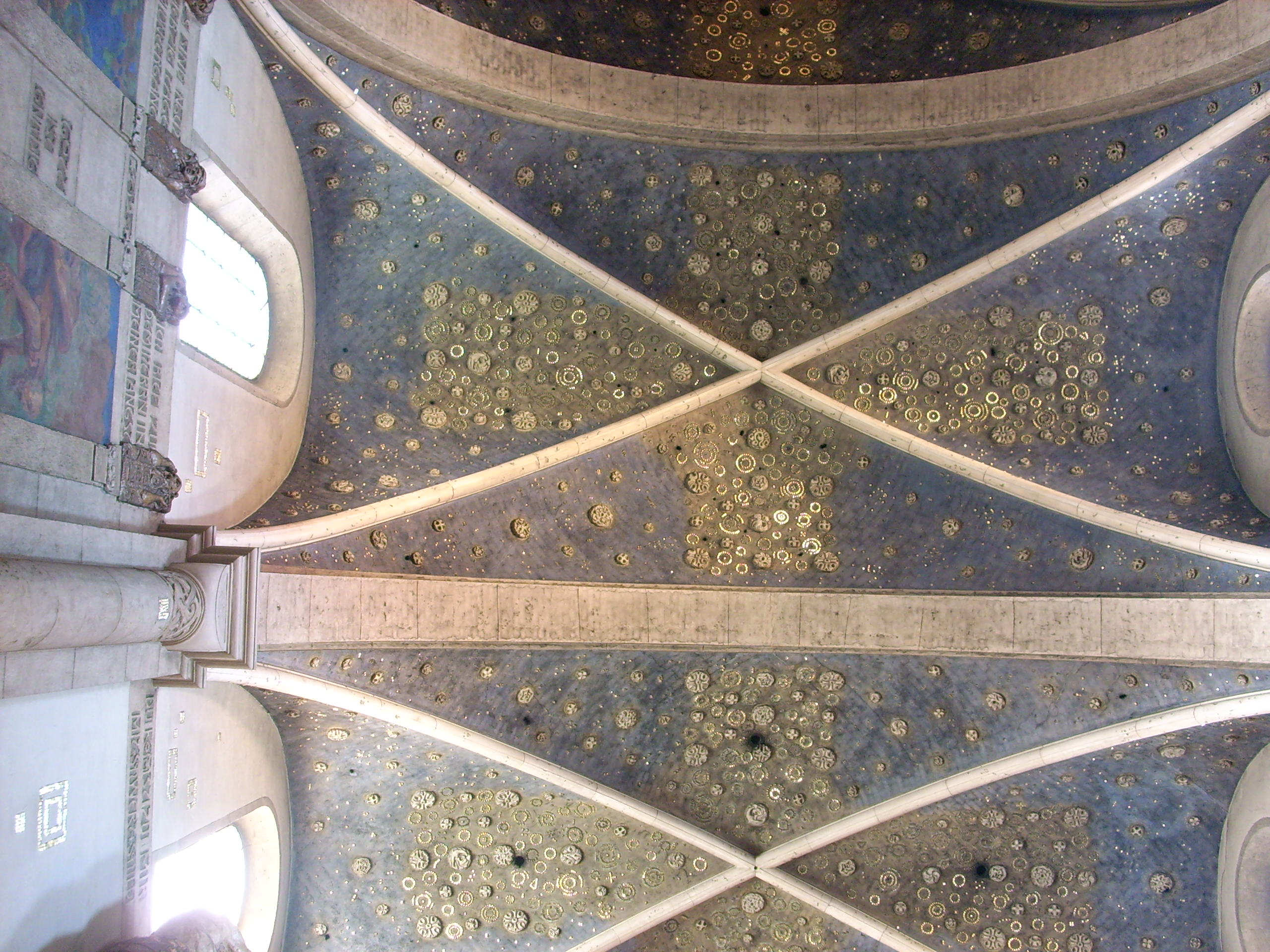 Blick zum reichverzierten Deckengewölbe